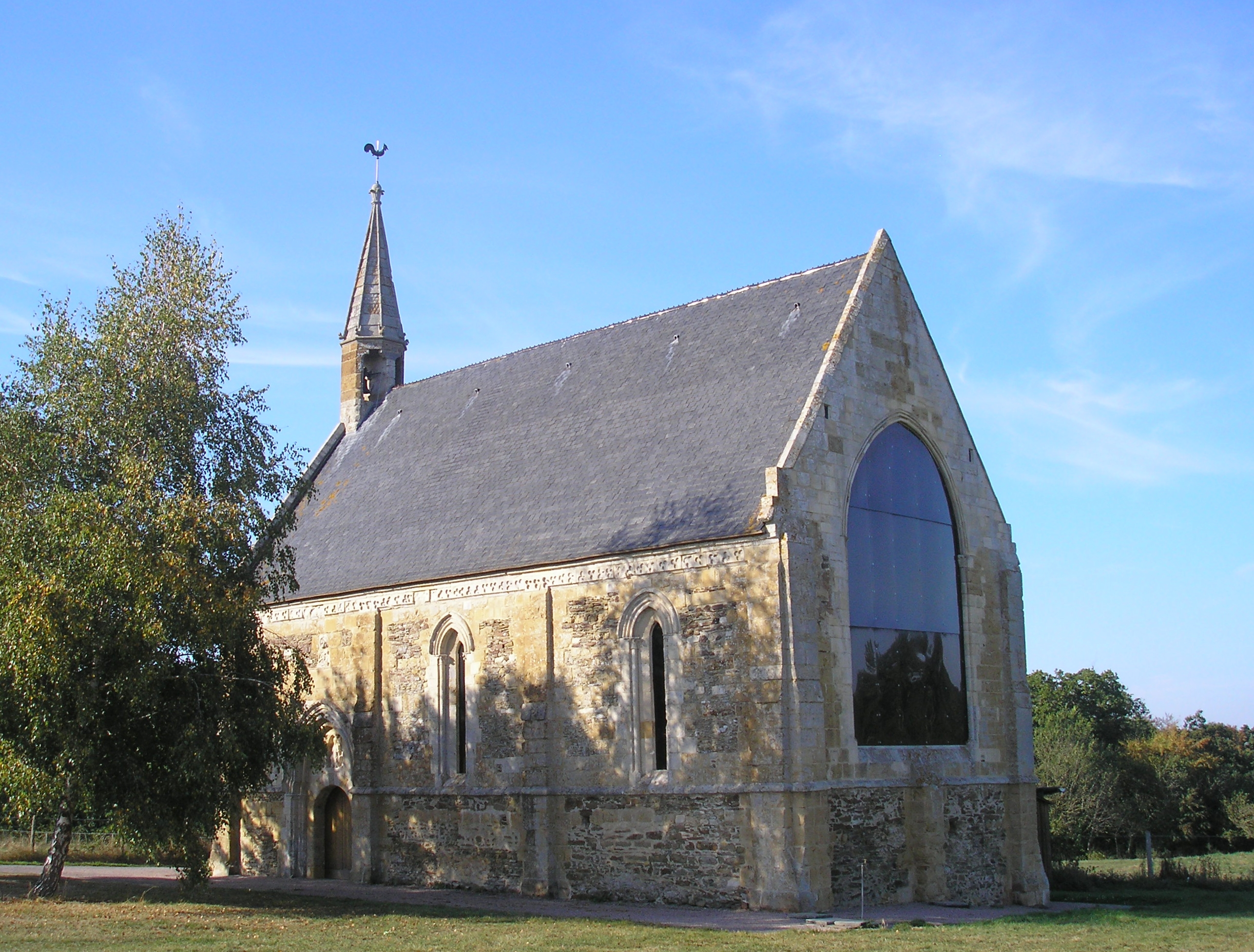 FranceNormandieBannevilleSurAjonChapelleSaintClair